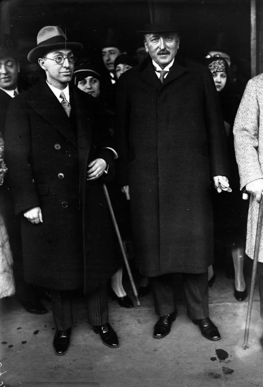 Der türkische Aussenminister Tewfik Ruschdi Bey (links) Staatssekretär von Schubert (rechts)